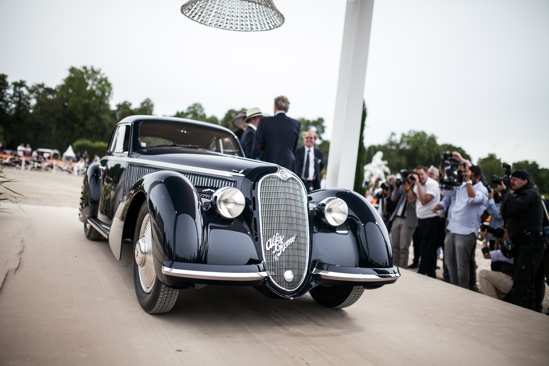 Alfa Romeo 8C 2900B Lungo Berlinetta at Chantilly Arts et Elegance Richard Mille 2016